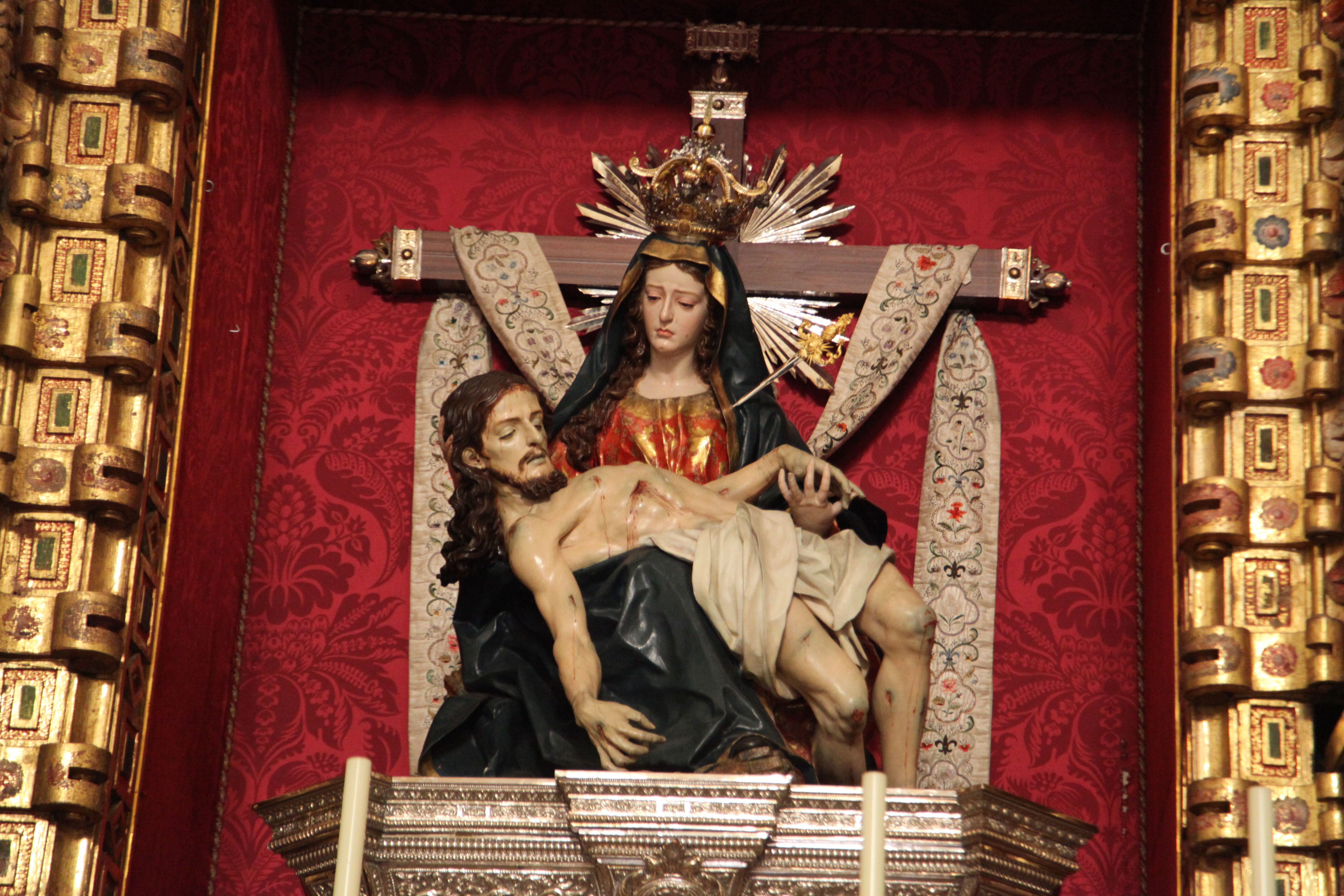 Church of Santa María de la Alhambra